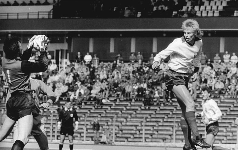 ADN-ZB-Franke-23.4.88-fra- Berlin: Fußball-Oberliga BFC Dynamo - HFC Chemie 1:2 (1:0)- Eine überraschende Heimniederlage mußte der BFC hinnehmen. Die Gäste hielten im Feldspiel gut mit und deckten in zunehmendem Maße Anfälligkeiten der BFC-Abwehr auf. Torwart Karsten Härtel (HFC Chemie) pariert einen Kopfball von Rainer Ernst (BFC).